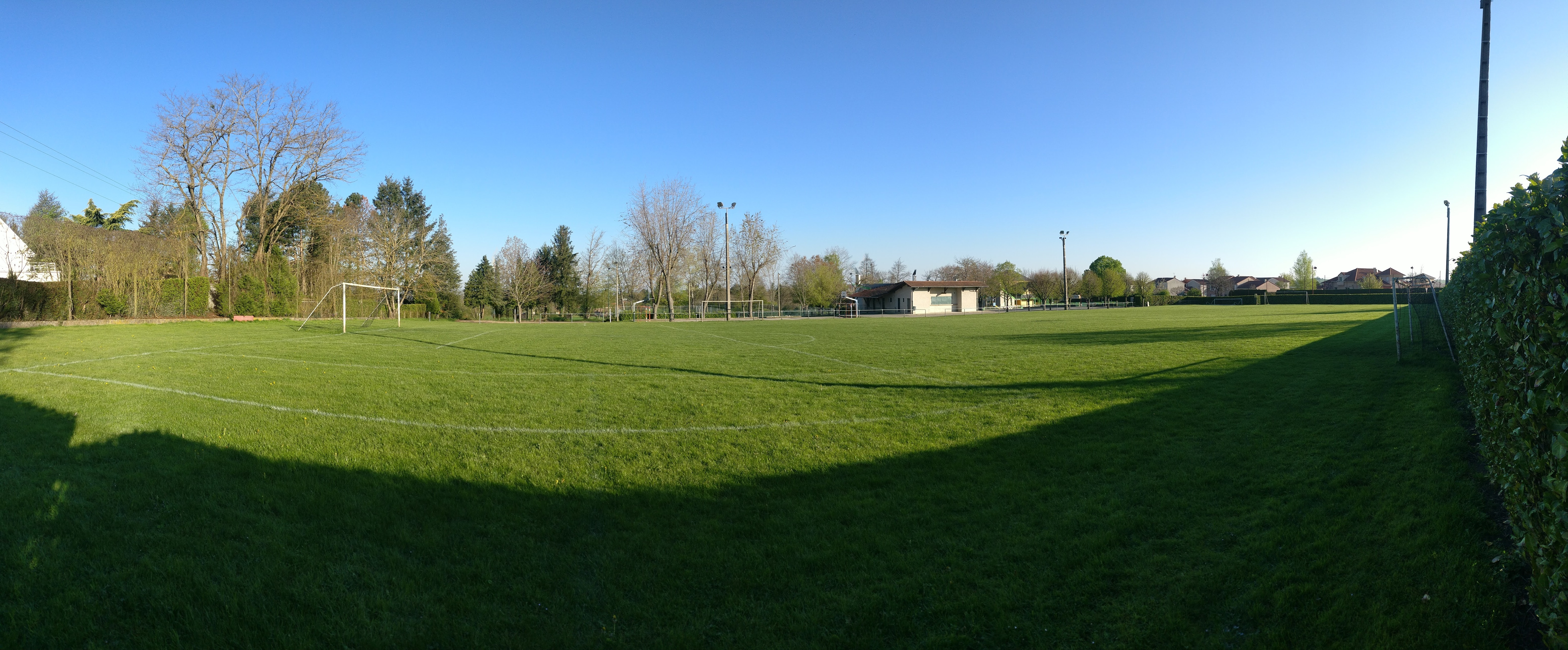 Vue panoramique du stade de foot de le Vernet (Allier), France